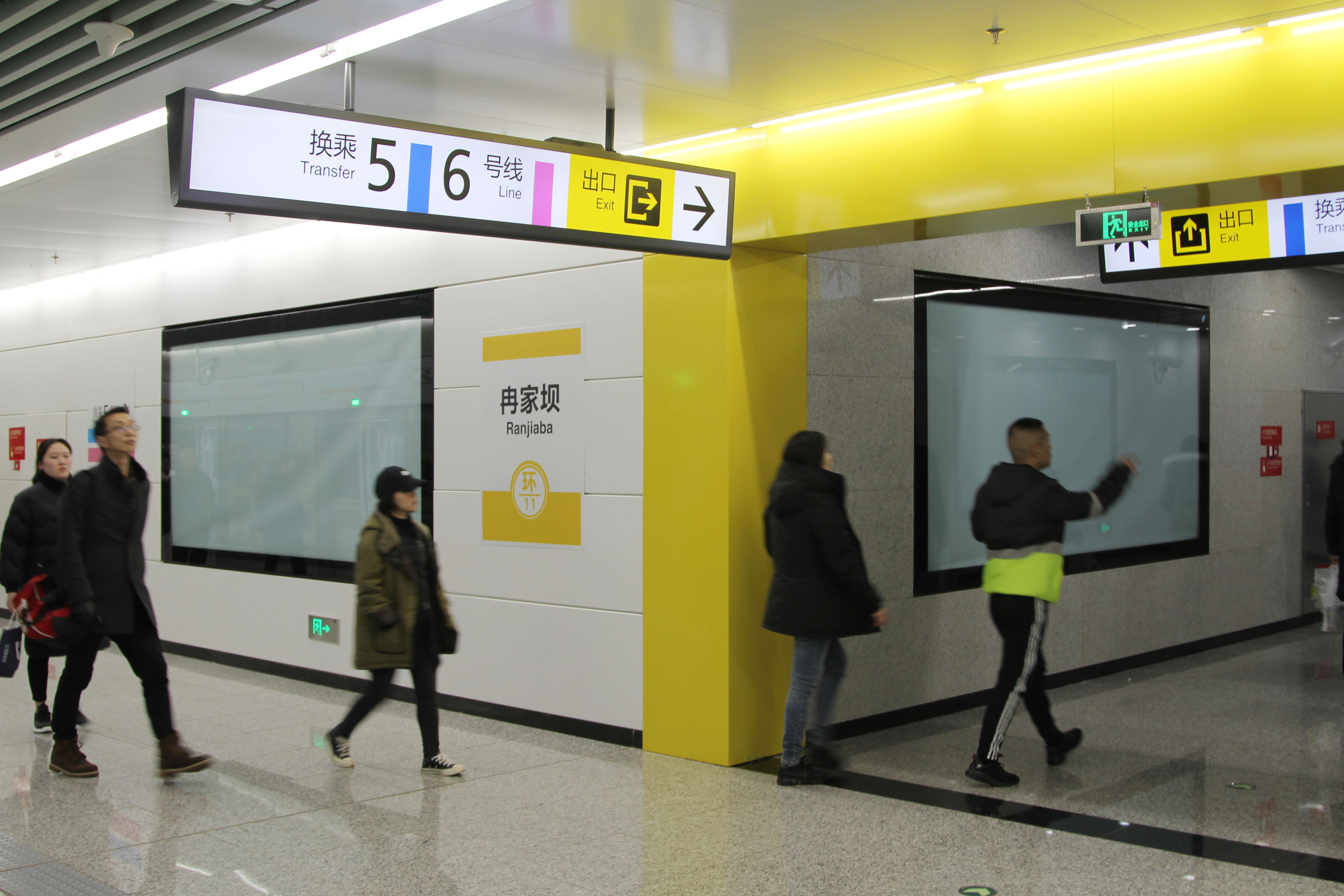 中文（中国大陆）: 环线冉家坝站换乘